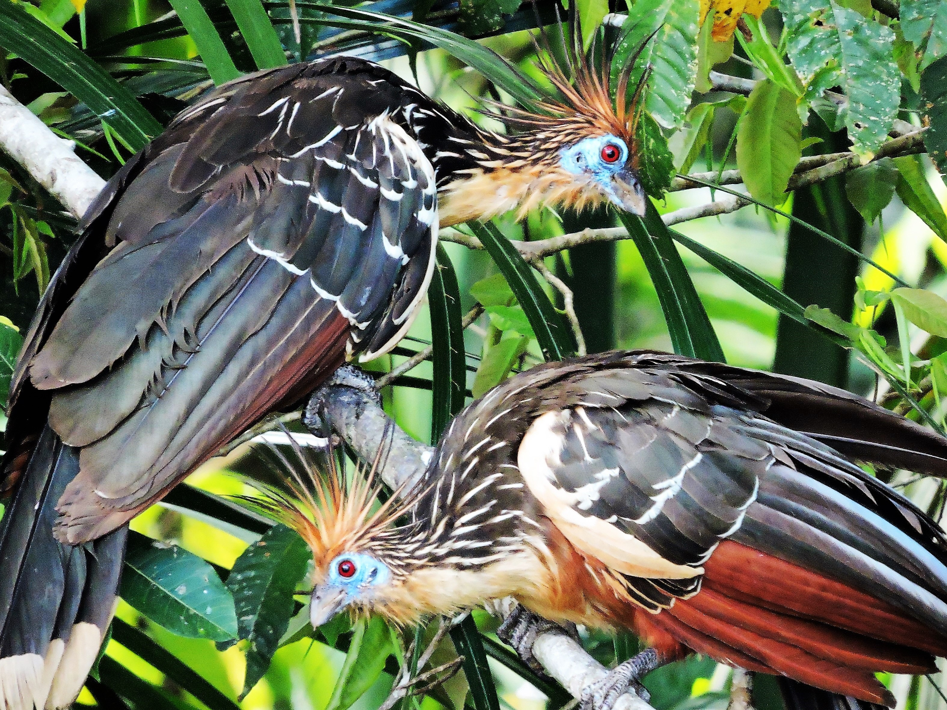 Pareja de sereres (Opisthocomus hoazin)